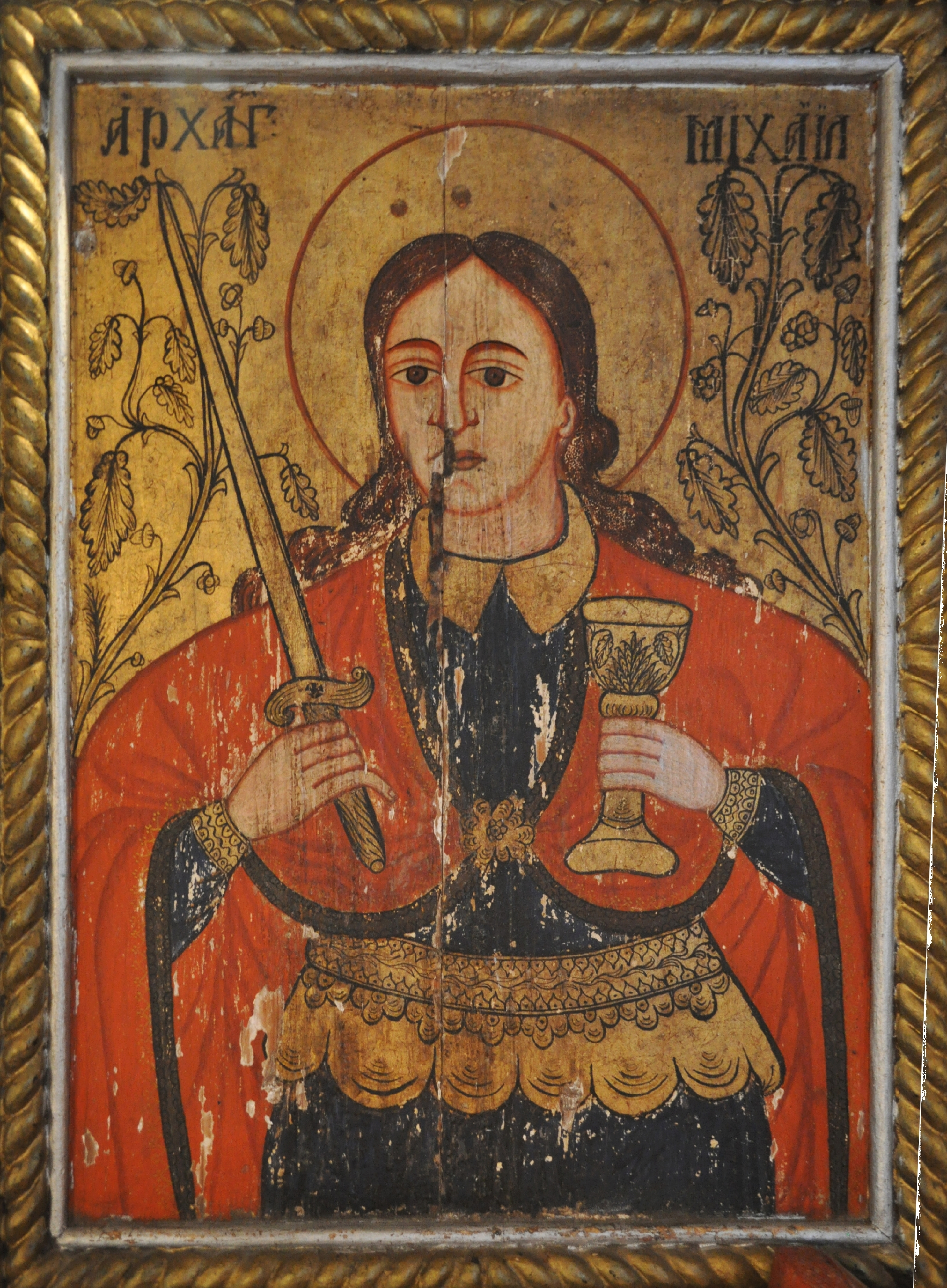 Biserica de lemn „Sfinții Arhangheli” din Runc, județul Alba